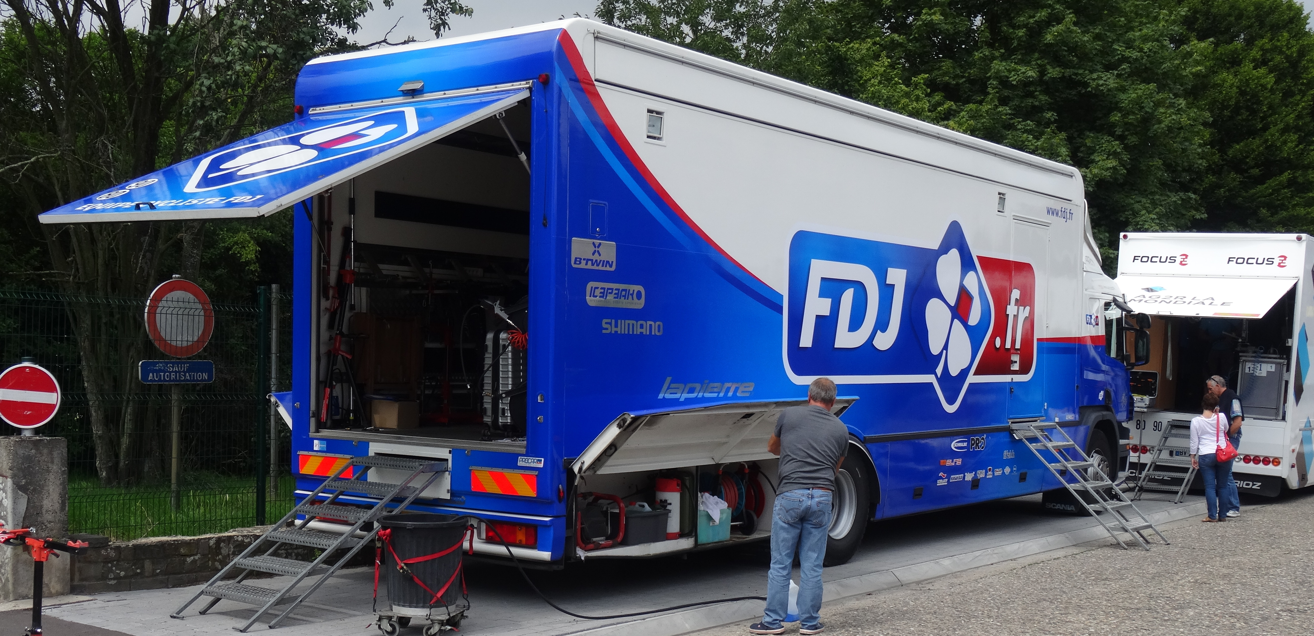 Reportage photographique réalisé le mercredi 30 juillet à l'occasion de l'arrivée de la cinquième et dernière étape du Tour de Wallonie 2014 à Alleur (Ans), Belgique.